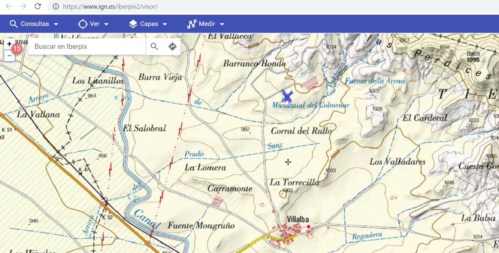 Sector del hallazgo, zona Barranco Hondo, Villalba (Soria), según imagen obtenida del Instituto Geológico Minero (IGM) 18/06/2019